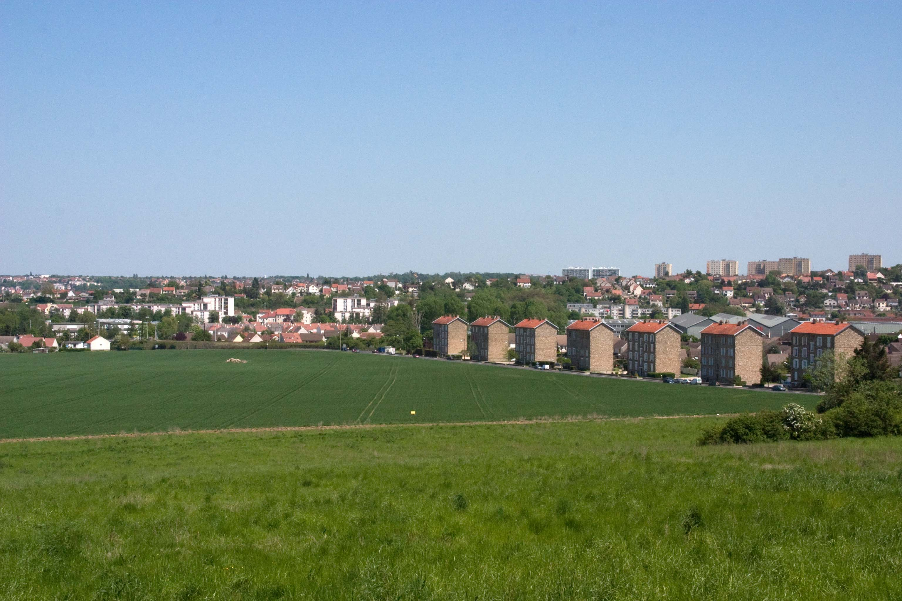 Villabé, Essonne, France Cirque de l'Essonne à Villabé